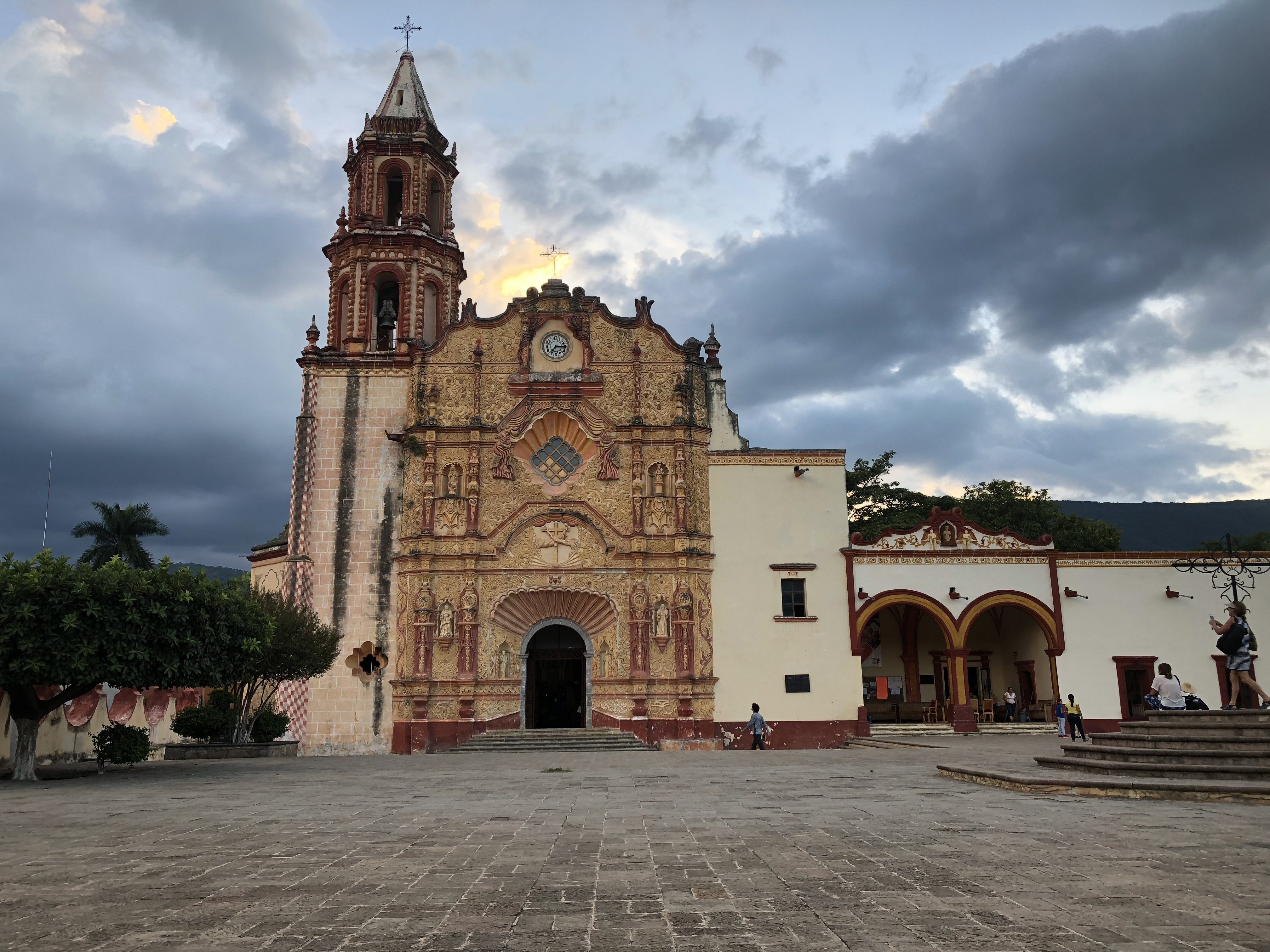 Foto de la Misión de Santiago de Apostol, tomada de forma frontal